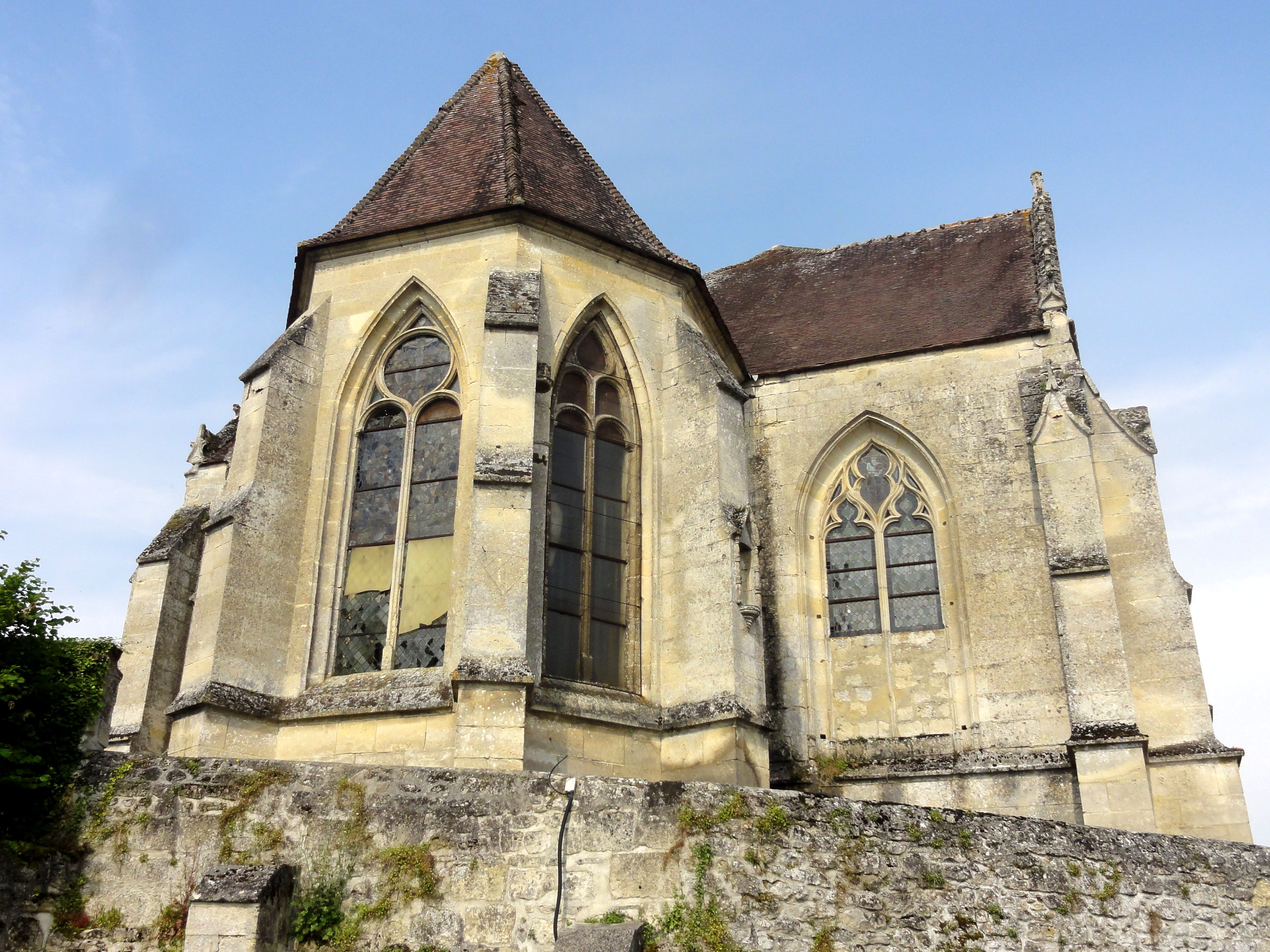 Vue depuis l'est.